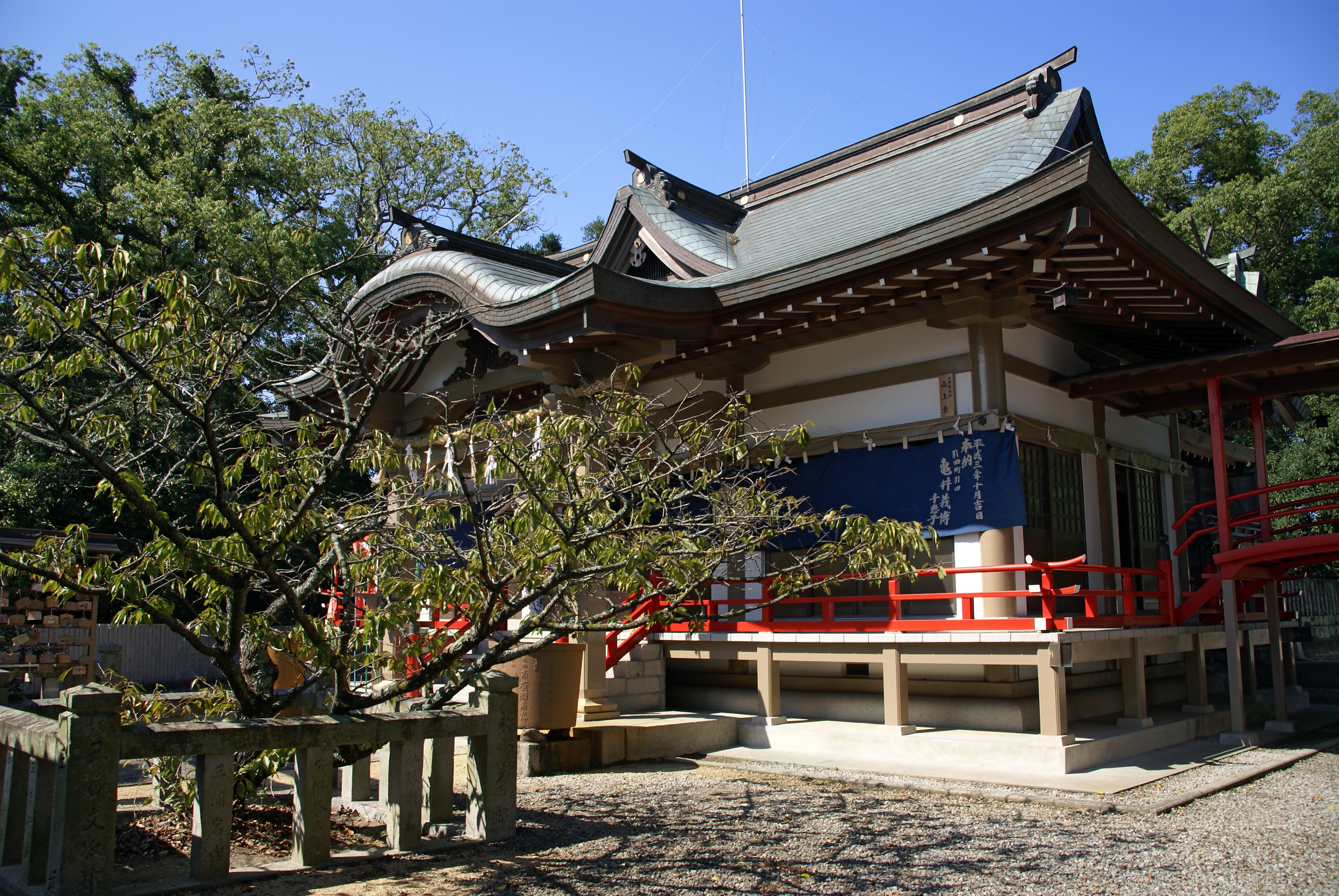 Honda-hachiman-jinja in Hiketa, Higashikagawa, Kagawa prefecture, Japan